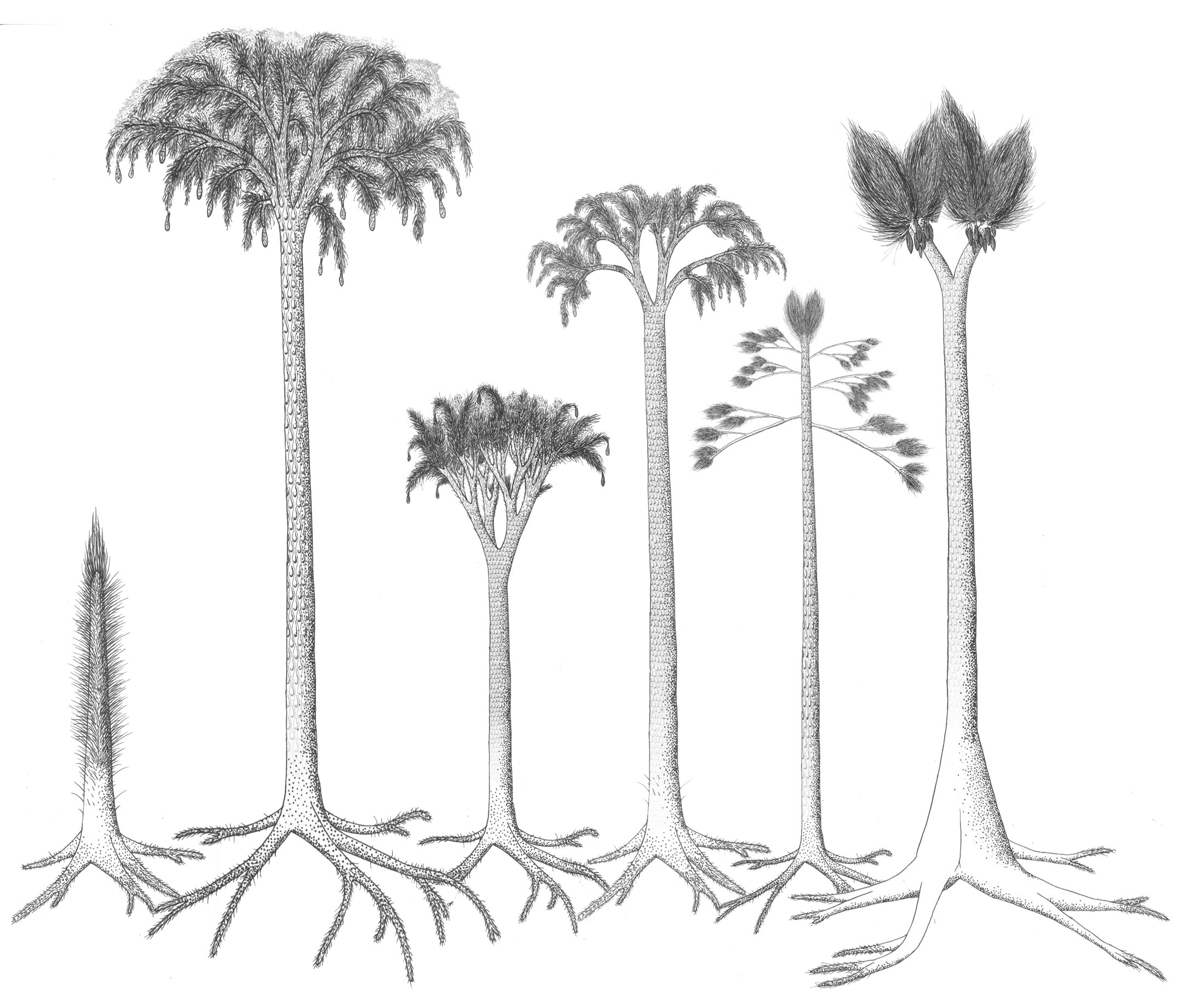 Reconstrucción de los vegetales fósiles del orden Lepidodendrales. Se muestra un ejemplar juvenil génerico del grupo, un ejemplar de Lepidodendron, Lepidophloios, Diaphorodendron, Synchysidendron y Sigillaria.